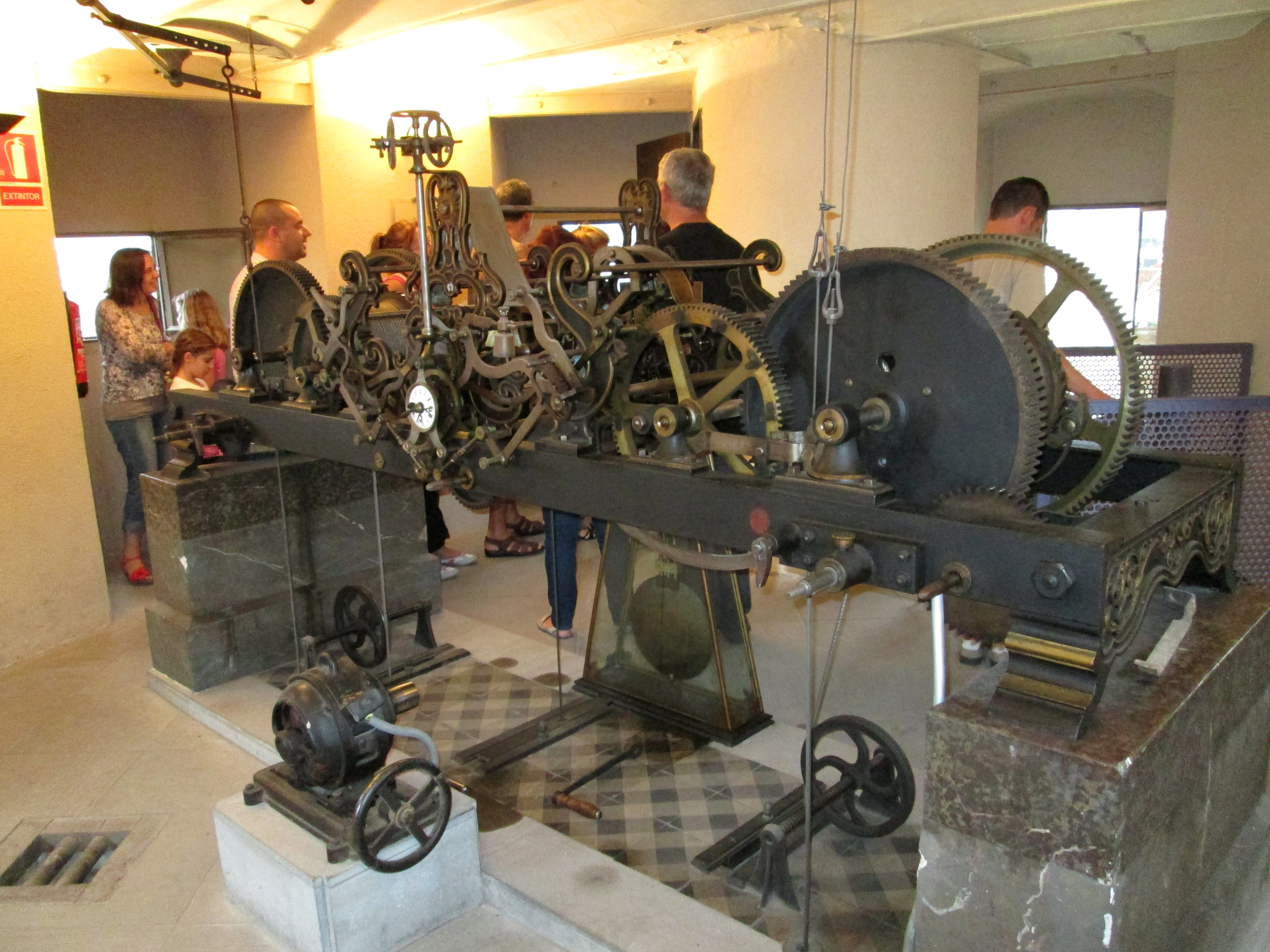 Reloj del campanario de la iglesia de San Félix de Sabadell. El reloj está situado en el segundo piso, fue construido en 1903 en la casa de Paul Odobey de Morez du Jura, en Francia, siendo instalado por el relojero local Ramón Utesà i Aymamí, que era el responsable de los relojes públicos de la ciudad. El reloj funciona pero no acciona las campanas, actualmente lo hace un reloj electrónico, programable y que con una antena registra automáticamente los cambios horarios.